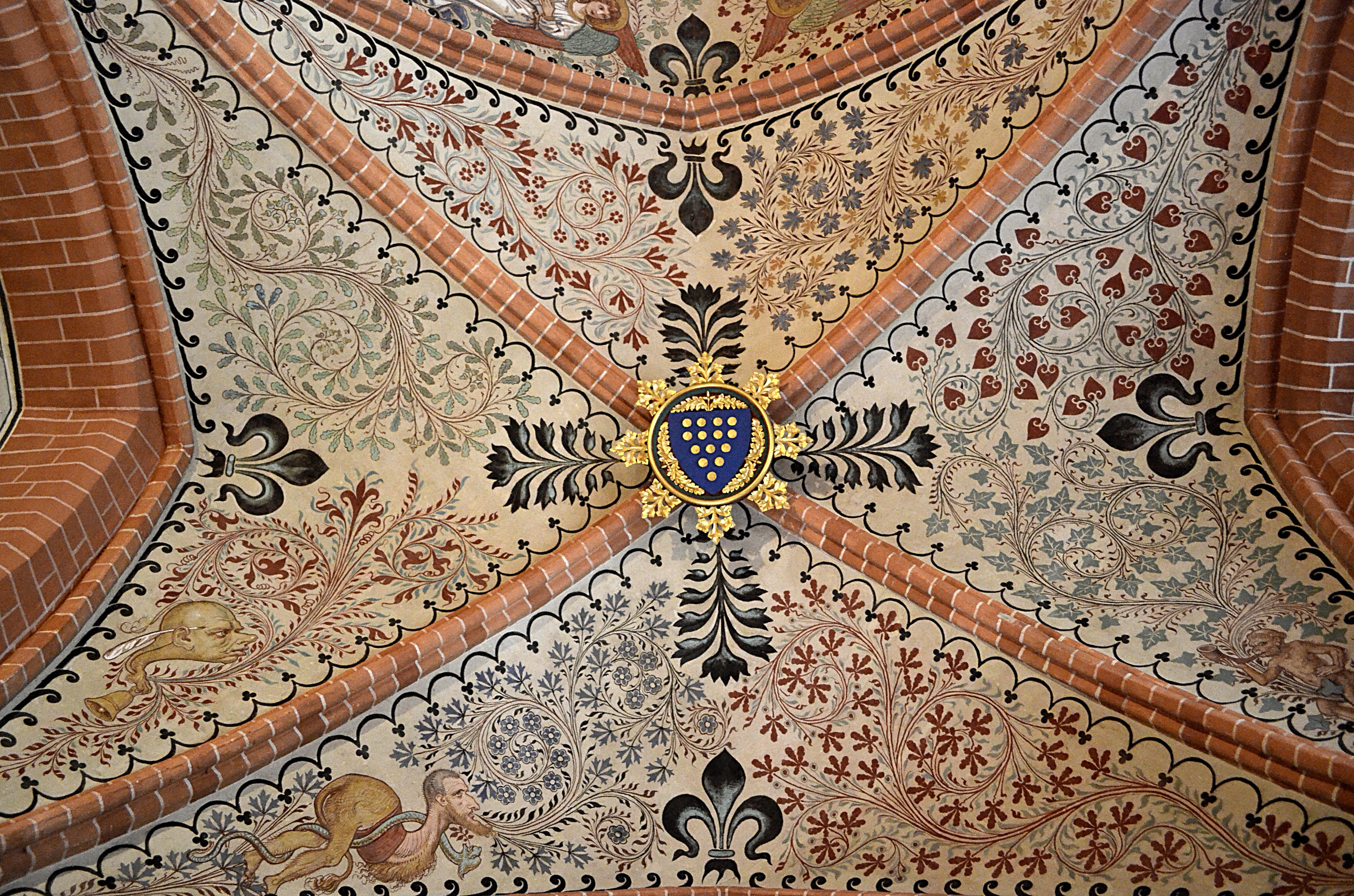 Bad Doberan, Münster, Bülow Kapelle mit historischer Ausmalung von Carl Andreae, 1873, Deckengewölbe mit Schlussstein 1. S